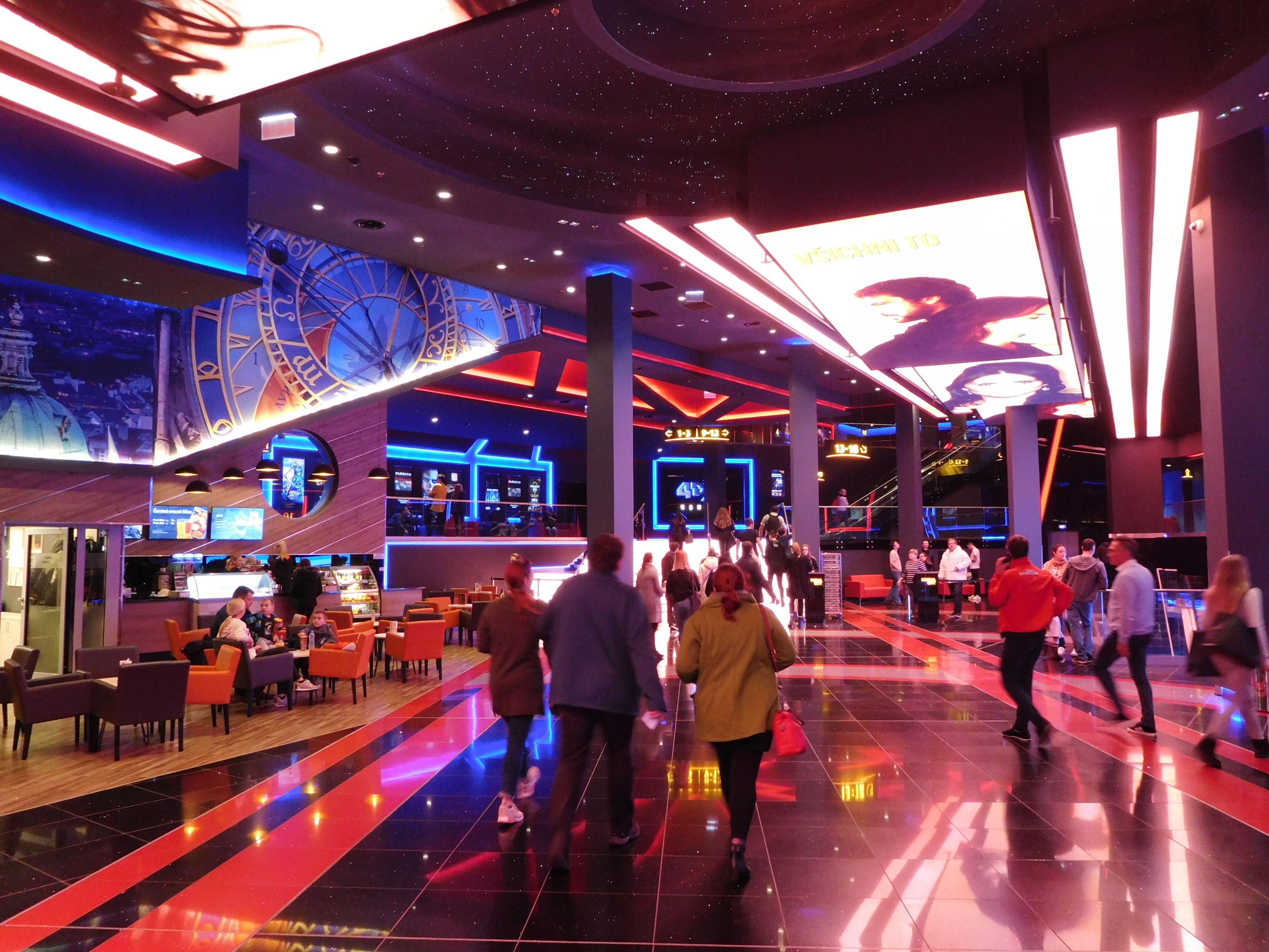 Praha - Chodov, Cinema City v Centru Chodov, interiér